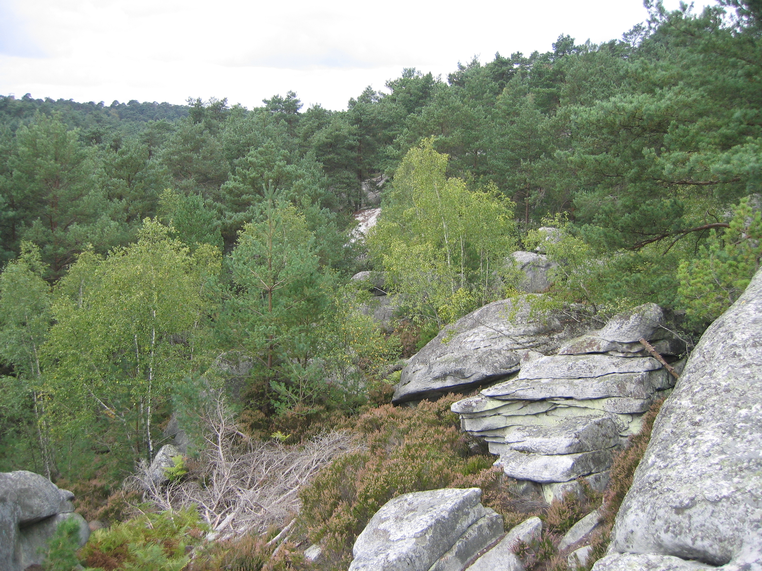 Bord de la gorge